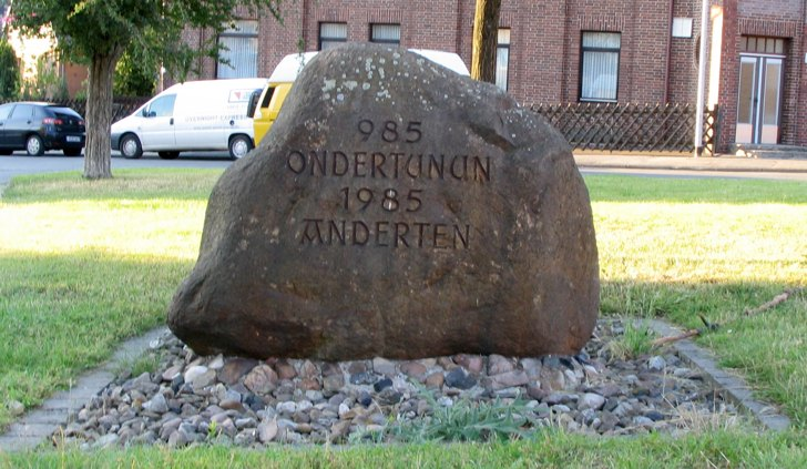 Hannover-Anderten, Gedenkstein zur 1000 Jahr-Feier 1985